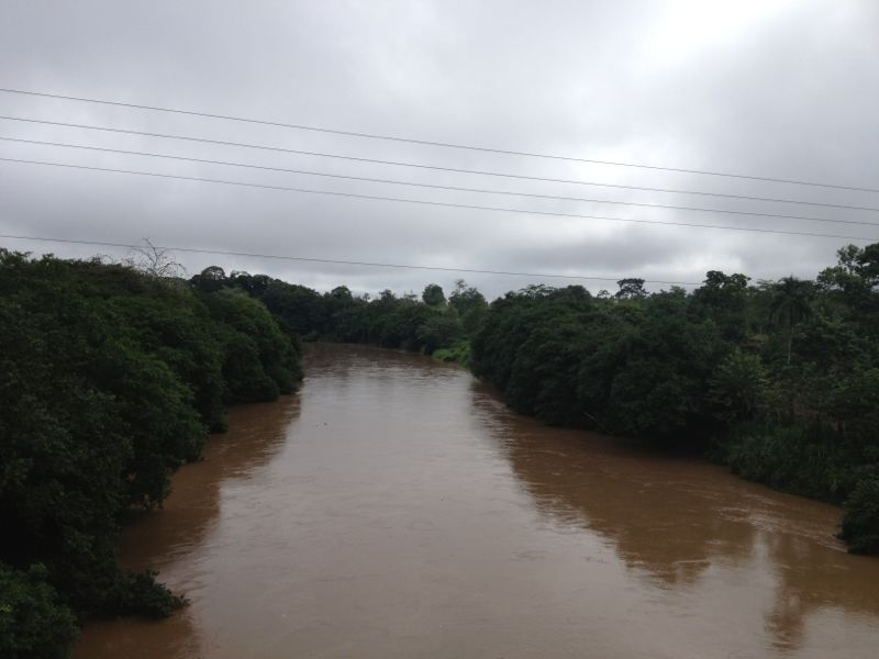 Desde el puente del río San Carlos, el Ferry, distrito de Cutris.